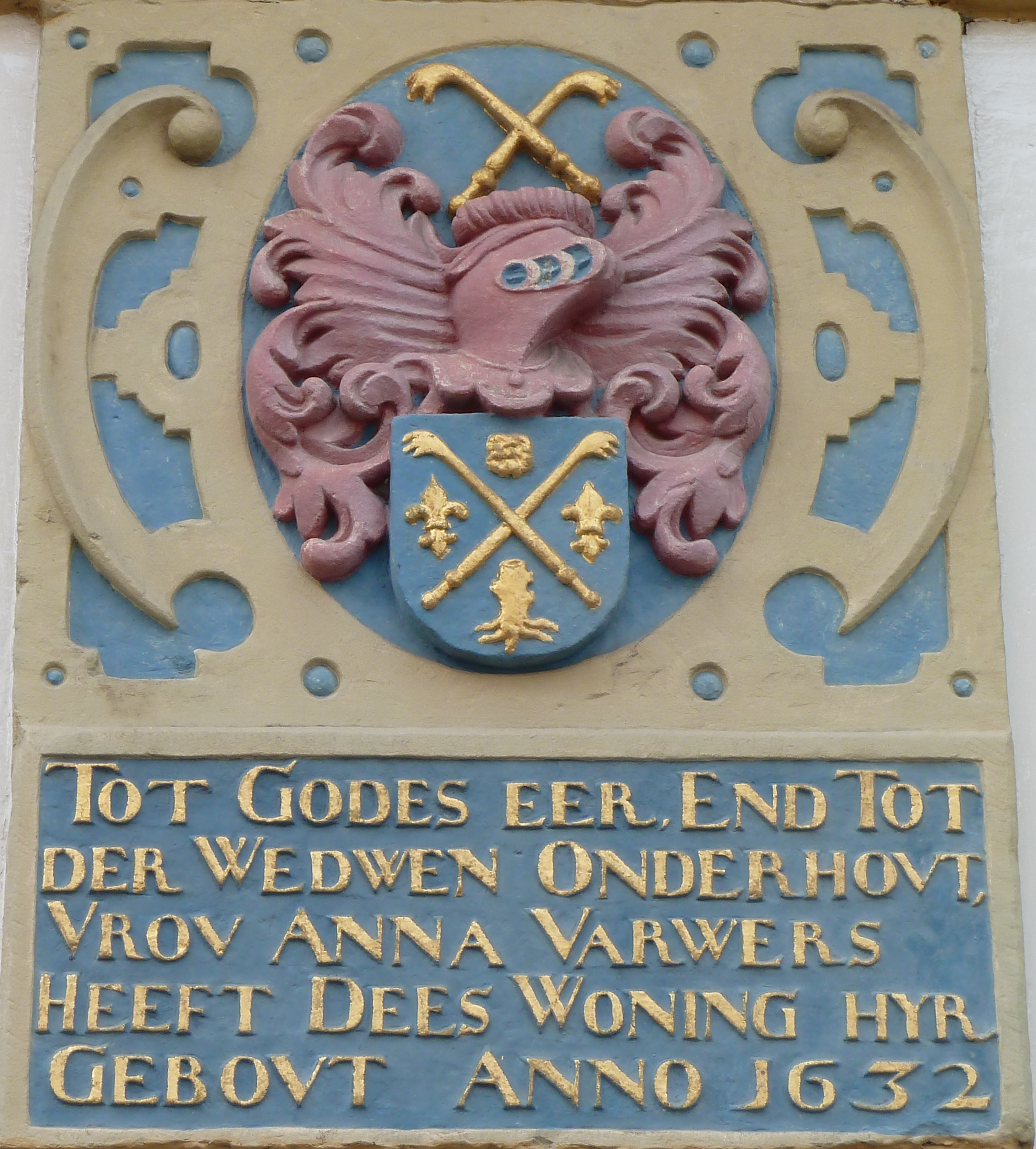 Opschrift op het Anna Varvers Convent, Nieuwe Kijk in 't Jatstraat nr. 12-16, Groningen (Nederland)